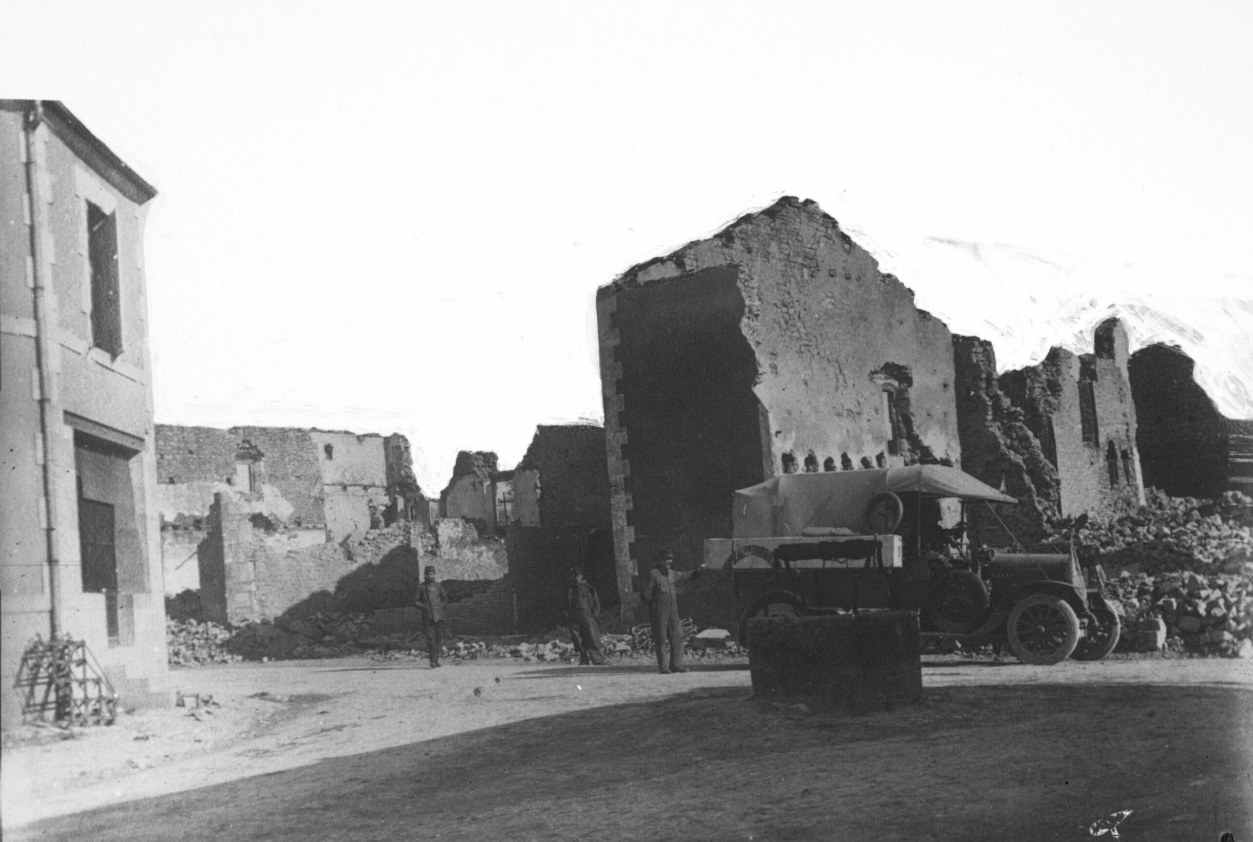 Ipécourt [i.e. Ippécourt] (Meuse) [habitations bombardées]